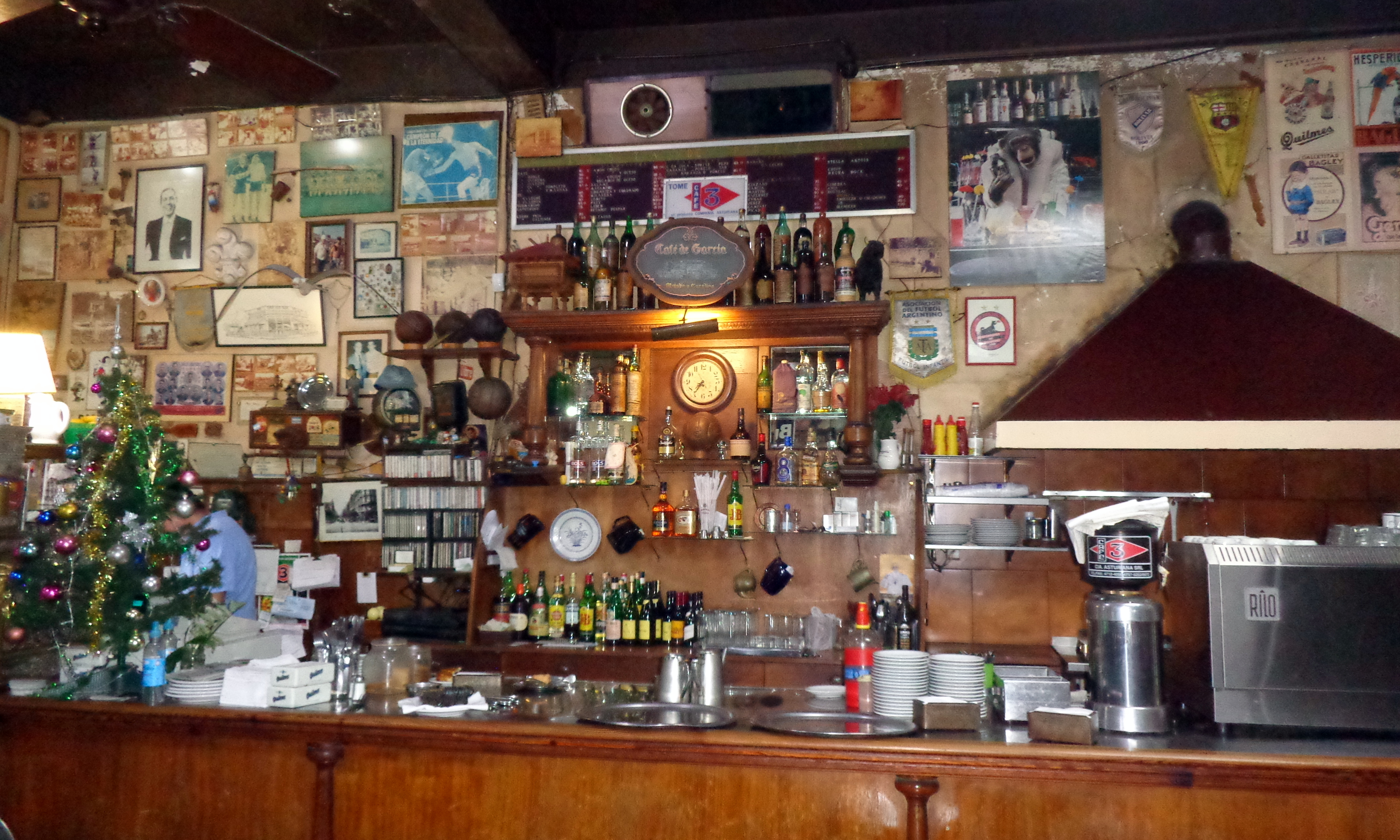 Salón principal, en el Café de García, Calle Sanabria 3302 (esquina con José P. Varela), Villa Devoto, Buenos Aires, Argentina.